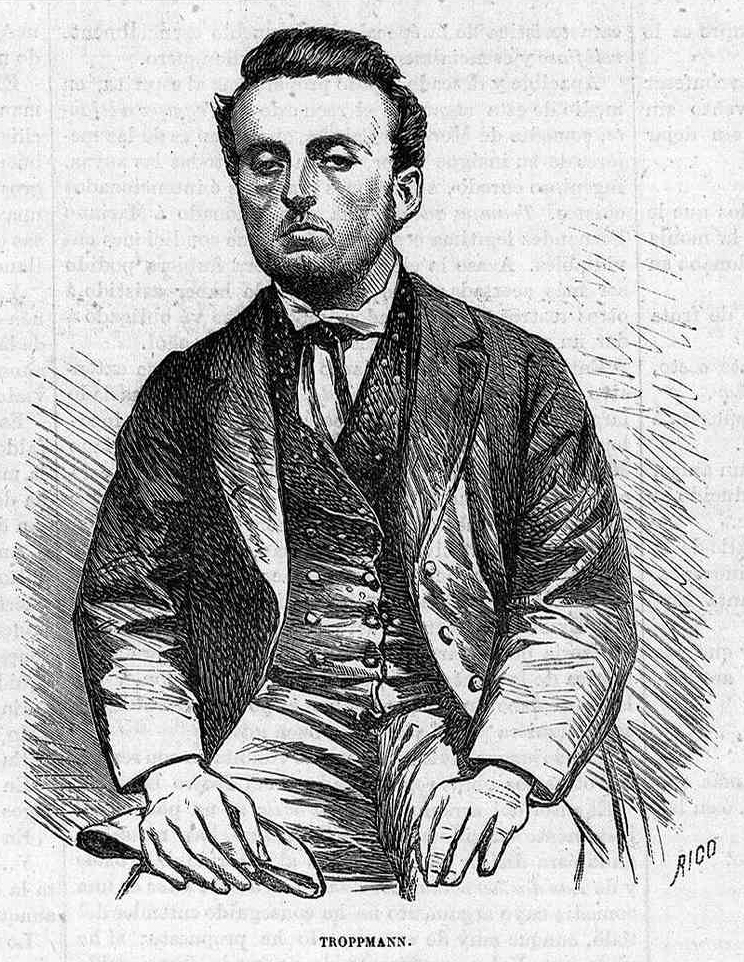 Troppmann, en la revista La Ilustración de Madrid.